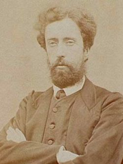 François Jourde (1843-1893)